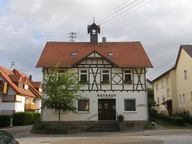 Beinstein 2009